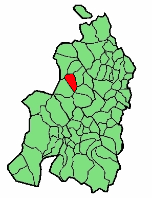 aipaturiko udalerriaren kokapena Nafarroa Beherean